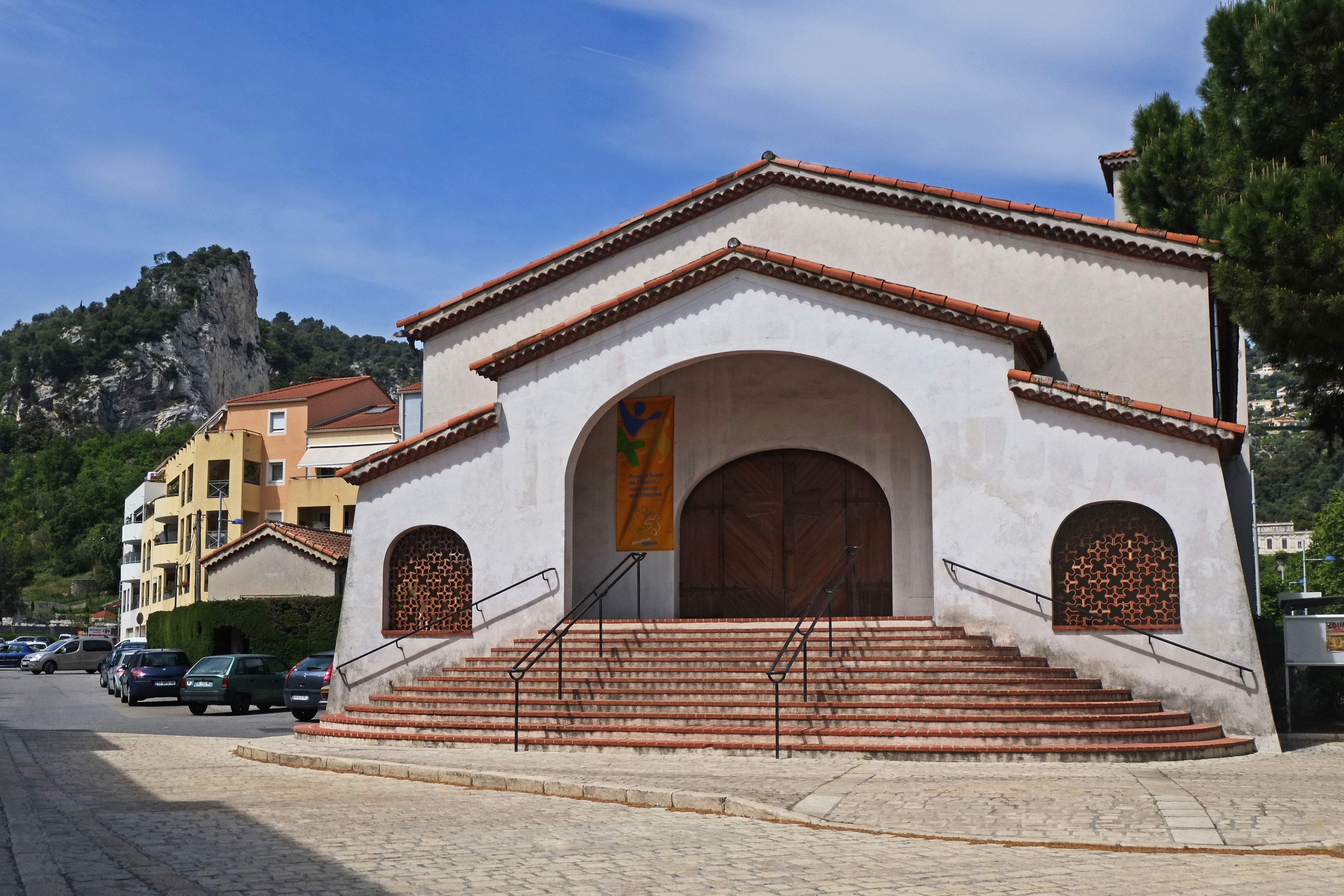 L'église de Saint-André-de-la-Roche